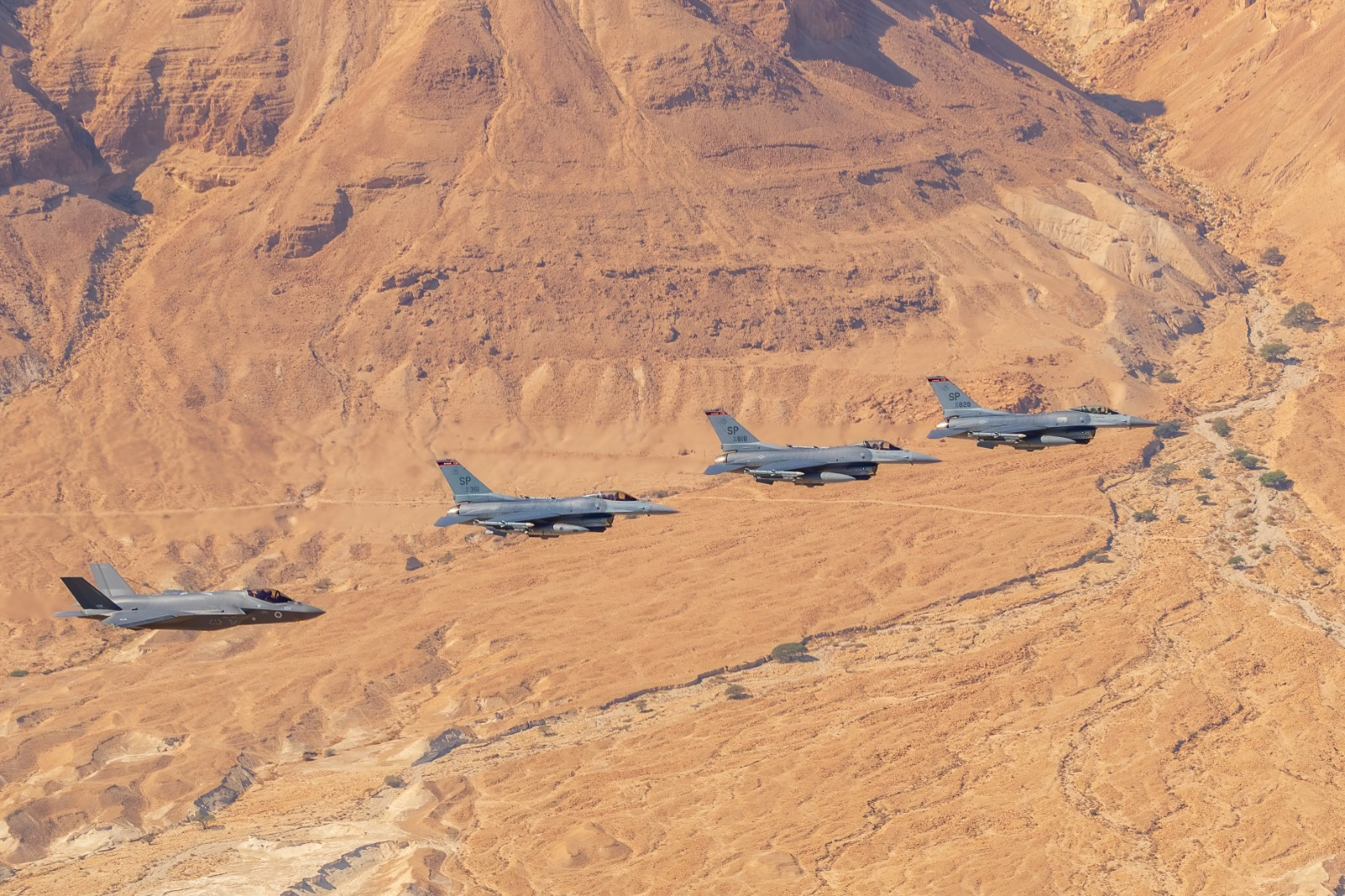 ה-F35 החדש במבחן ה"בלו פלאג".